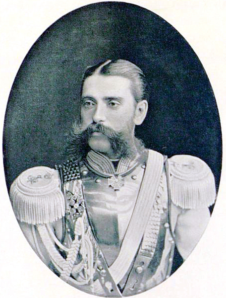 Николай Николаевич Шипов, командир Кавалергардского полка с 11 января 1881 по 14 июня 1884